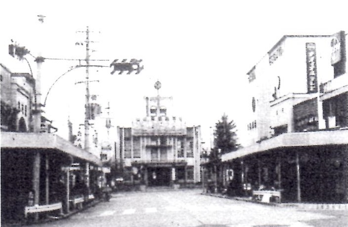 長野県飯田市。奥は復興記念館。右は常盤劇場（現在の飯田トキワ劇場）。